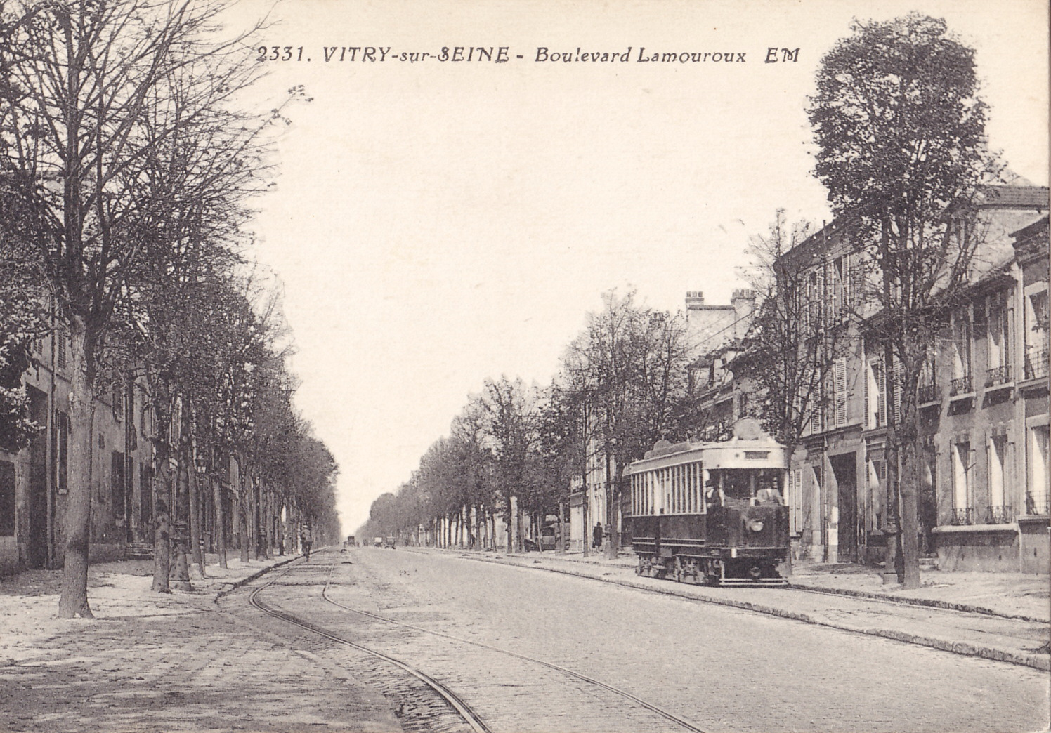 Carte postale ancienne éditée par EM, n°2331 : VITRY-SUR-SEINE - Boulevard Lamouroux